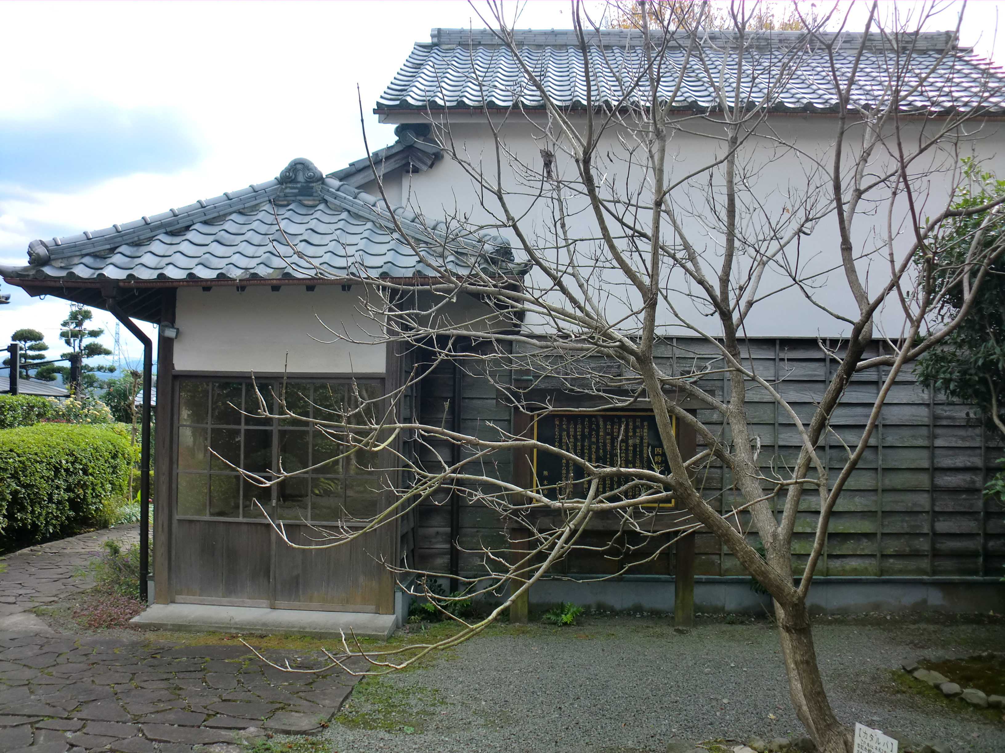 横井小楠（よこいしょうなん）記念館内にある四時軒（しじけん）